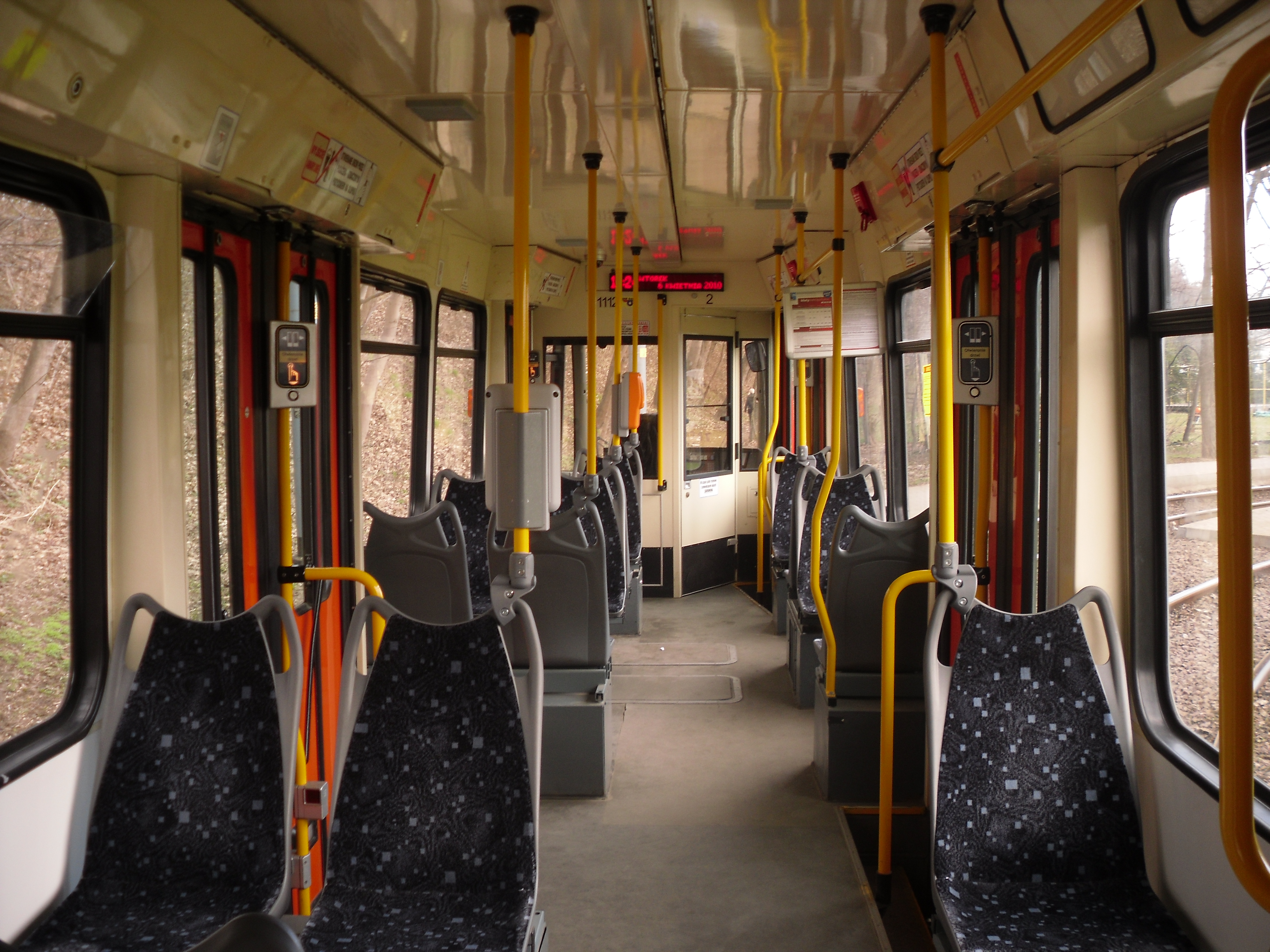 Wnętrze Düwag-Moderus N8CNF, Gdańsk.